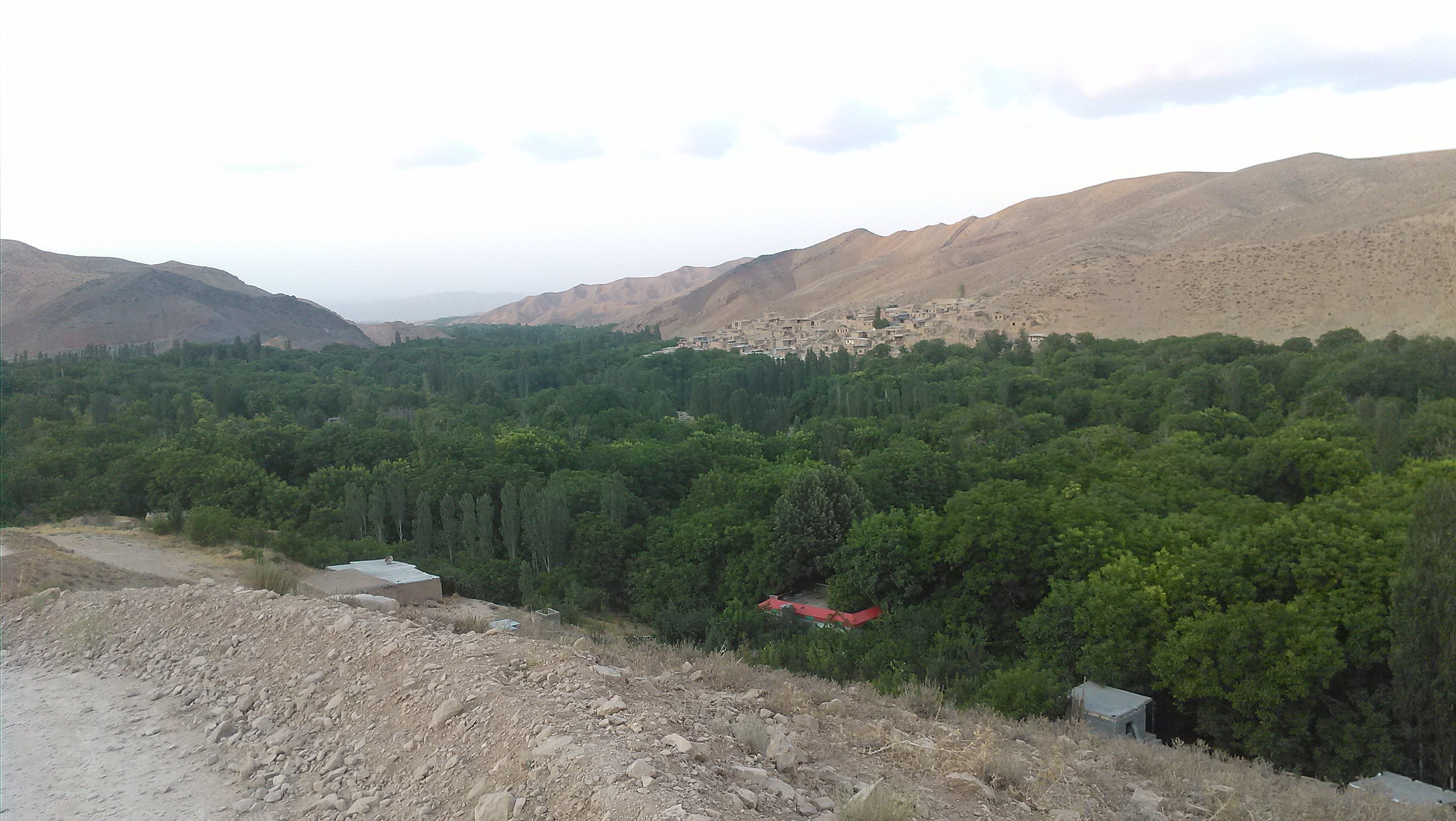 روستای زیبای فیروزه